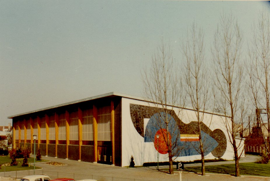 Gymnase Buchet à Juvisy-sur-Orge, façade sud qui reçoit une oeuvre de Ladislas Kijno.